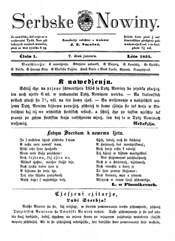 Лужичкосрпске новине Serbske Nowiny: № 1 (1854)